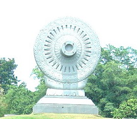 Buddhamondon